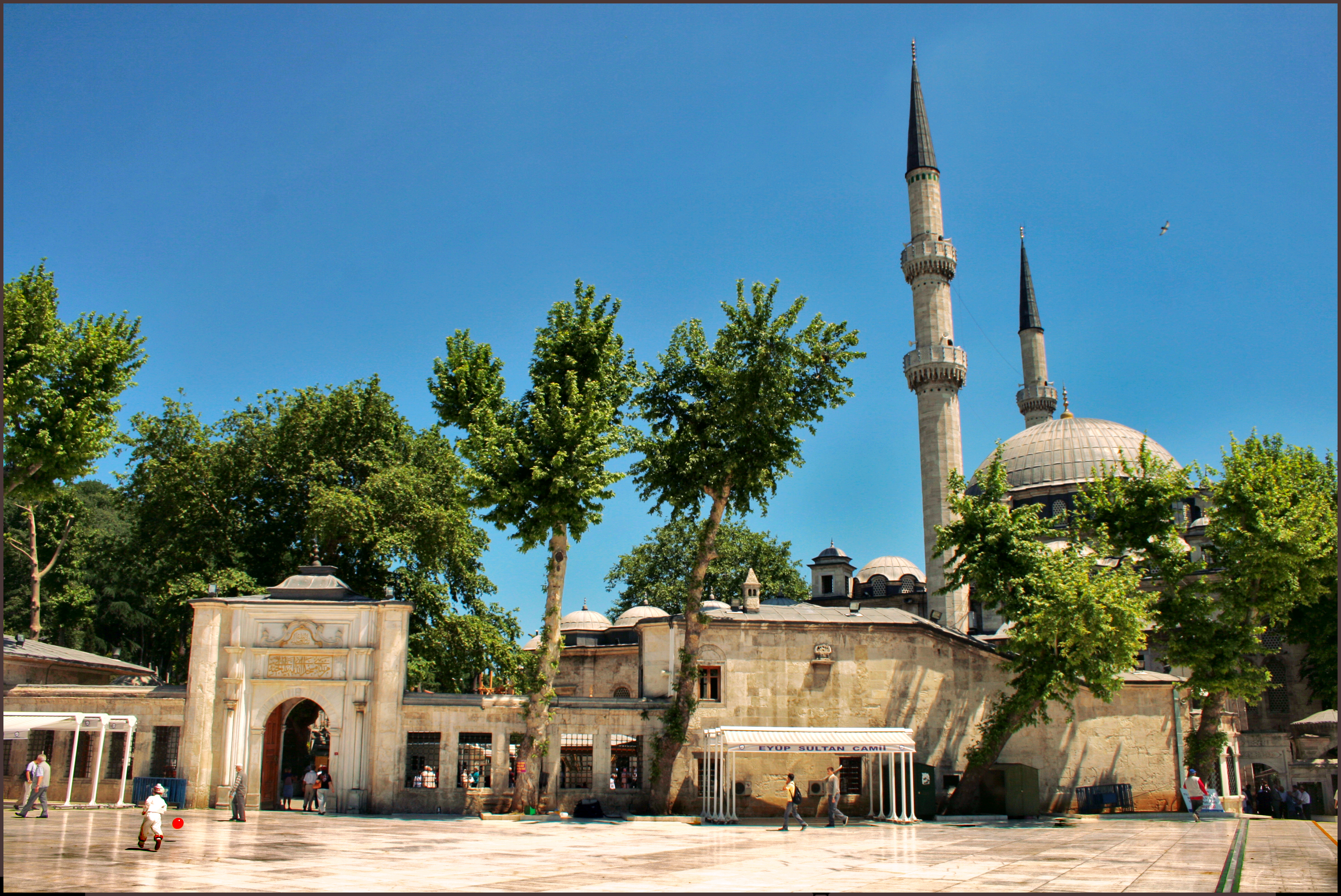 Eyup Sultan Cami